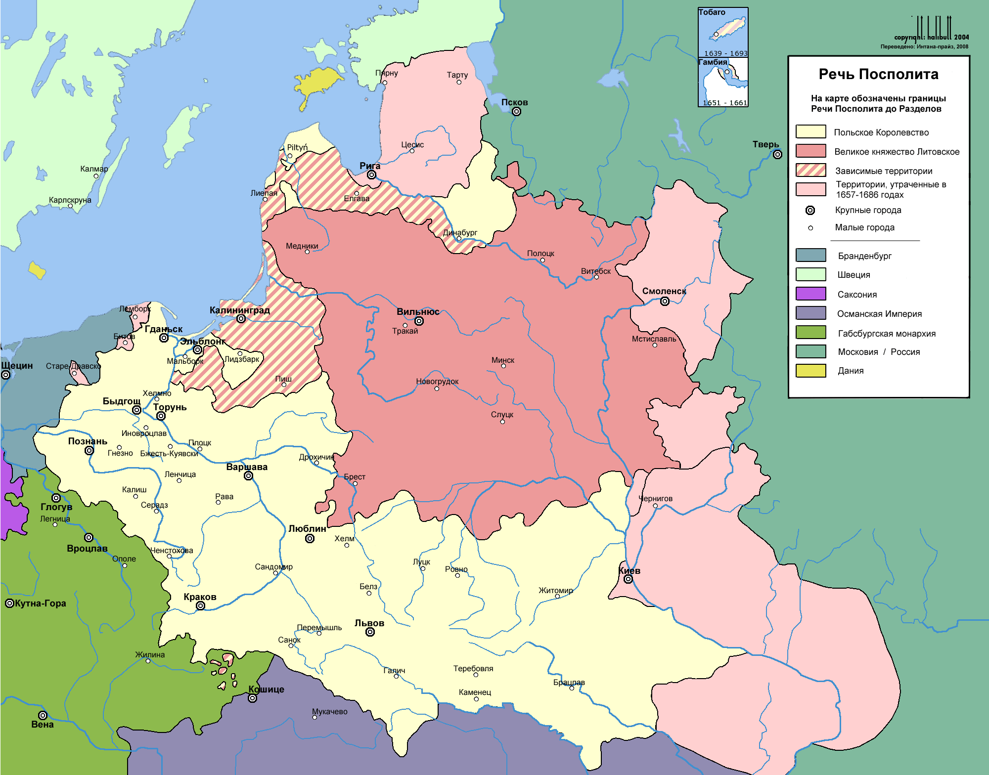 Карта Польши до разделов. При создании использованы современные названия городов. (Перевод файла Image:Rzeczpospolita.png)